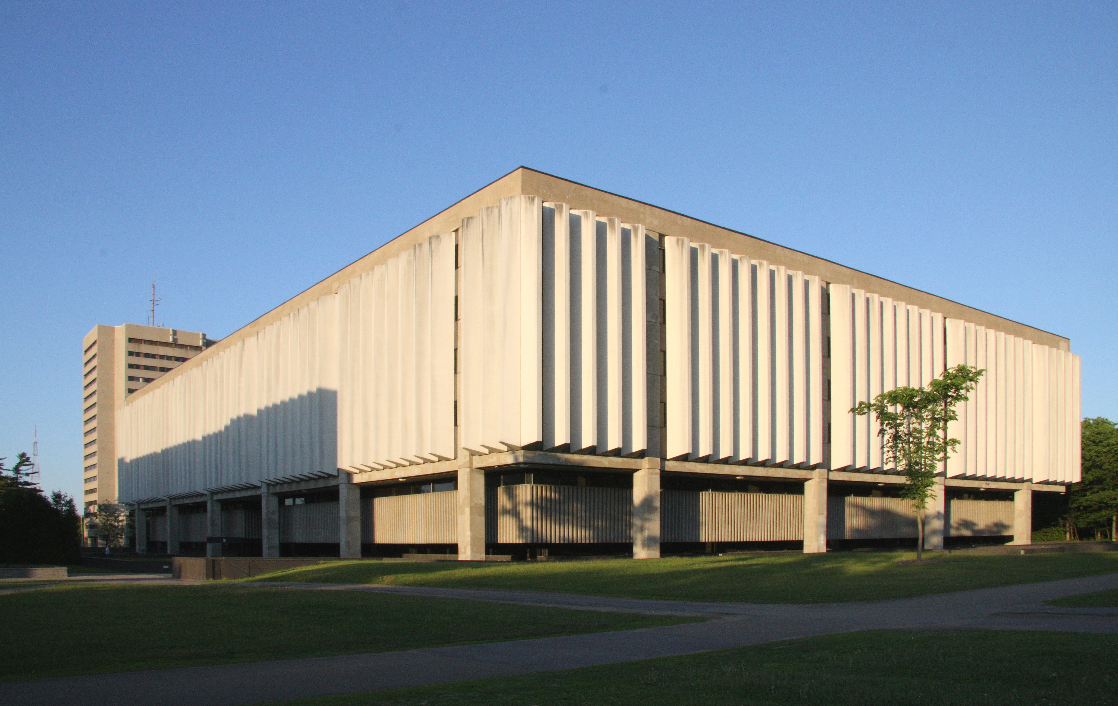 Pavillon Jean-Charles-Bonenfant où se trouve la Bibliothèque des sciences humaines et sociales de l'Université Laval.